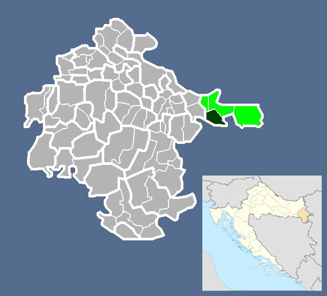 Српски (ћирилица): Насеље Бапска у саставу Града Илока.